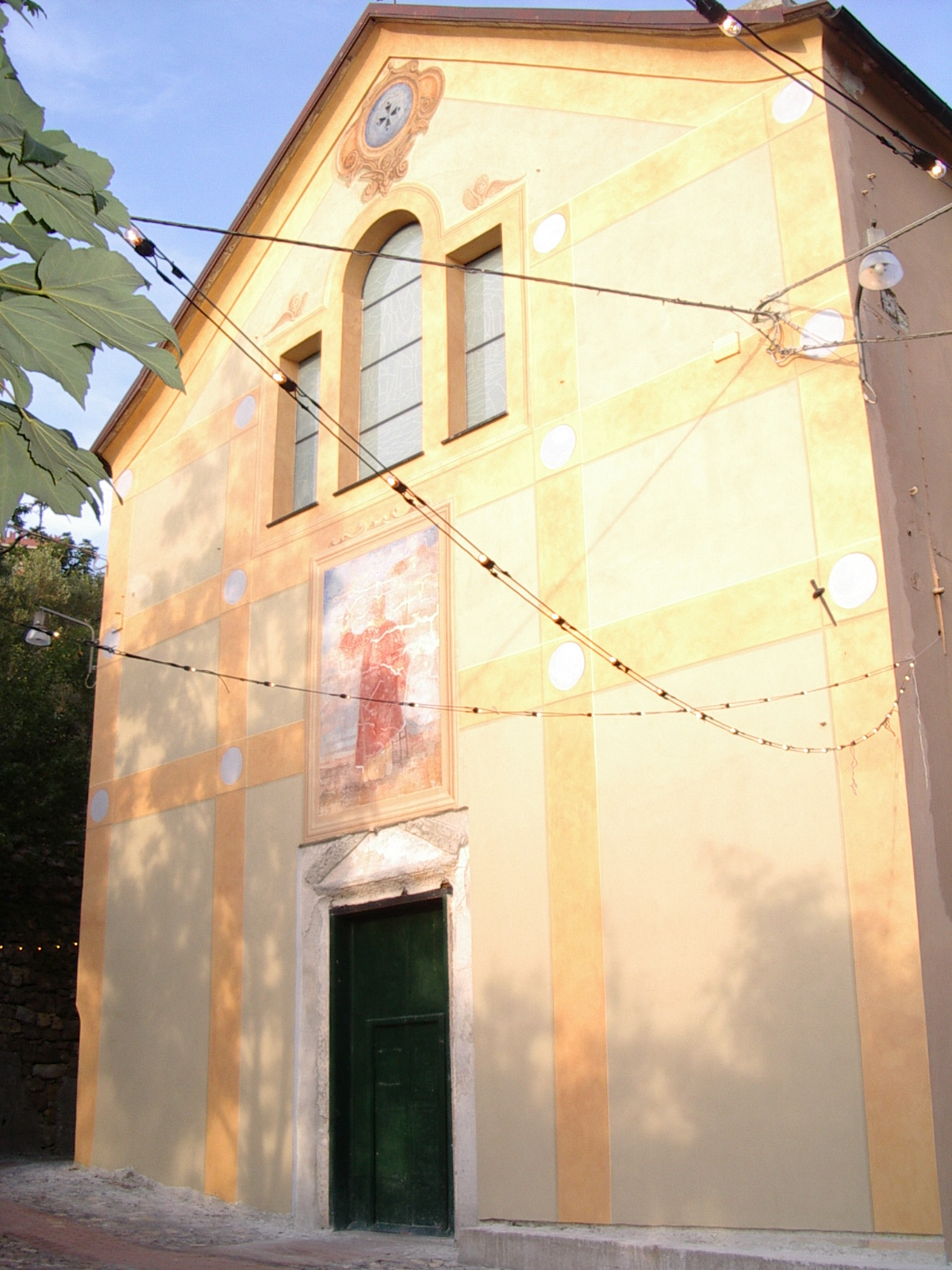 Chiesa parrocchiale S. Lorenzo in Premanico, Borgoratti (Genova)